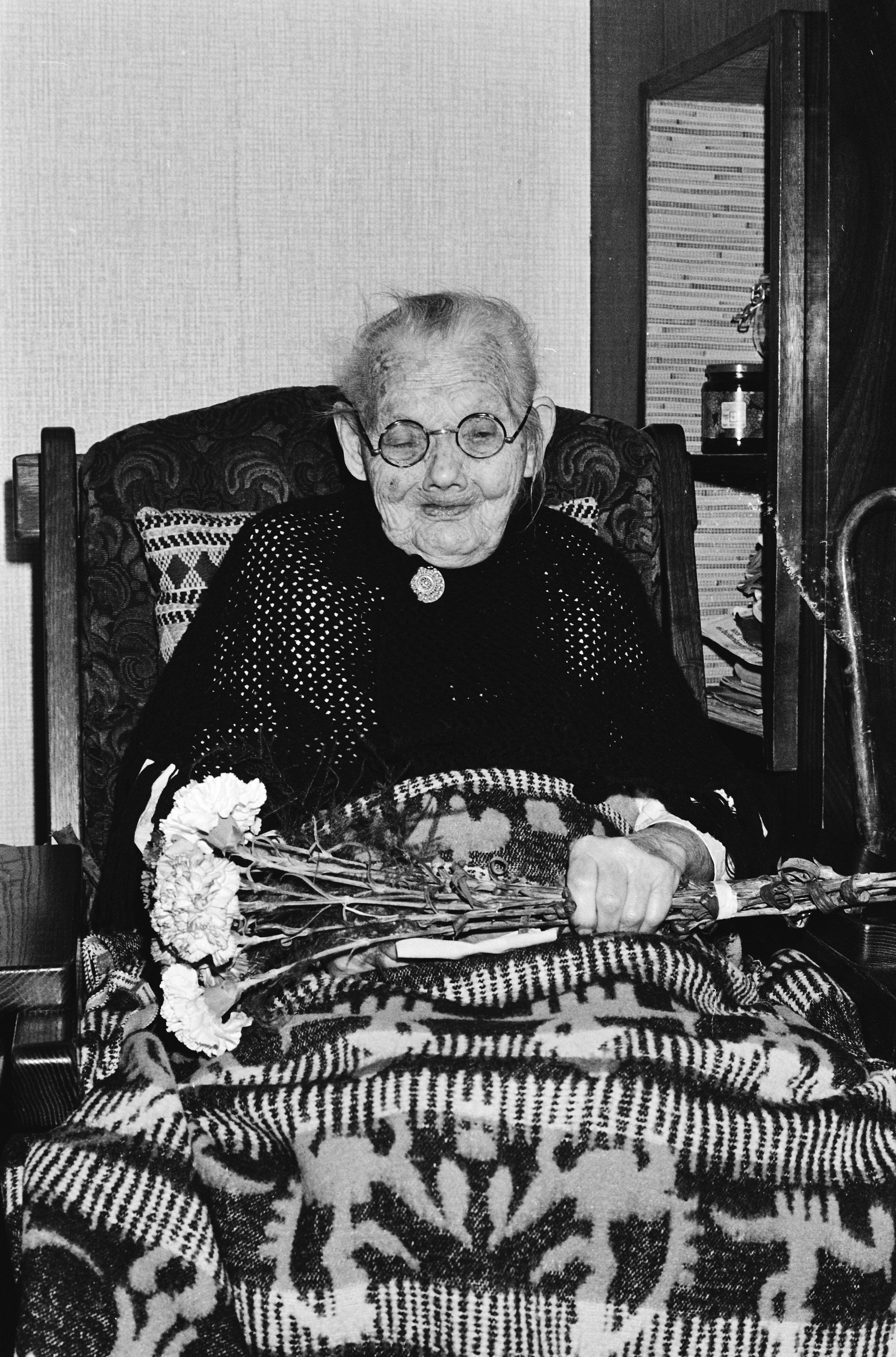 Collectie / Archief : Fotocollectie Anefo Reportage / Serie : [ onbekend ] Beschrijving : 110 Jarige Gerarda Huzenkamp Bosgoed (oudste Nederlander) Datum : 14 mei 1980 Trefwoorden : ouderdom Fotograaf : Dijk, Hans van / Anefo Auteursrechthebbende : Nationaal Archief Materiaalsoort : Negatief (zwart/wit) Nummer archiefinventaris : bekijk toegang 2.24.01.05 Bestanddeelnummer : 930-8267